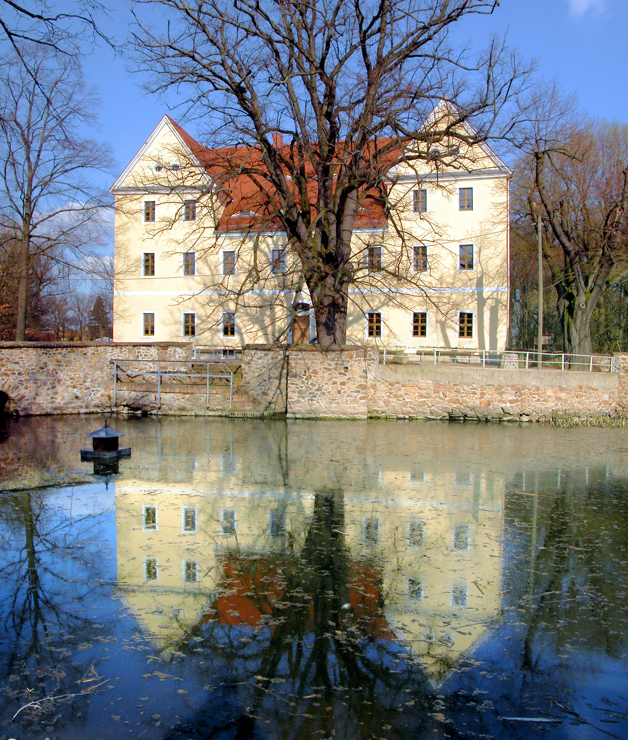 23.03.2012 04808 Röcknitz (Thallwitz), An der Wasserburg 3 (GMP: 51.450828,12.780060): Das Herrenhaus Röcknitz ist aus einer mittelalterlichen Wasserburg entstanden. Am hofseitigen Portal ist die Jahreszahl 1696 vermerkt. Im Schlußstein sind die Wappen der Familien von Plötz und von Birkholz zu sehen. Das kaum noch lesbare Monogramm I. P. C. A. V. B. verweist auf Joachim von Plötz und seine Frau Catharina Agnes von Birkholz. Seit 2004 wird das Gebäude als Vereinshaus und "Geoportal" genutzt. [DSCNn3505-3505.TIF]20120323605MDR.JPG(c)Blobelt